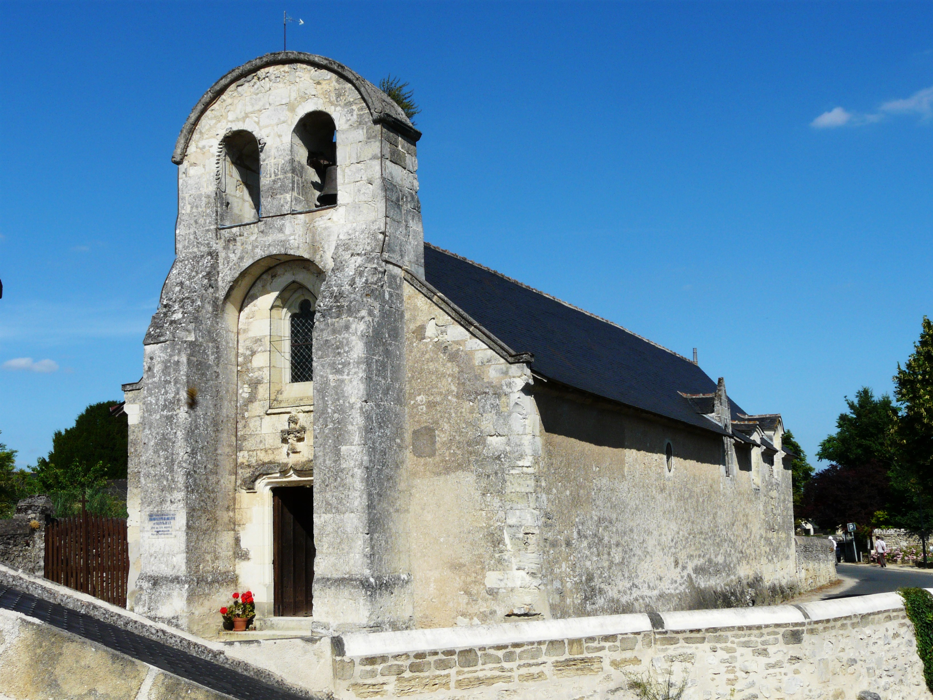 L'église Sainte-Madeleine et Saint-Jean de Rochemenier, Louresse-Rochemenier, Maine-et-Loire, France